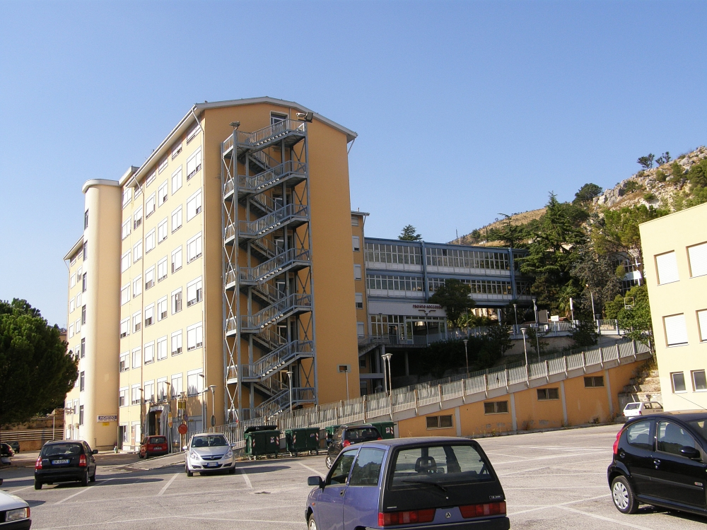 Popoli